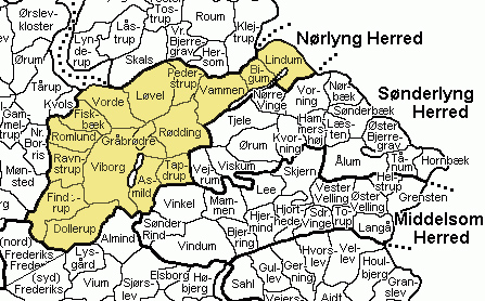 old Viborg Amt, Denmark Source: 'Map by Svend-Erik Christiansen